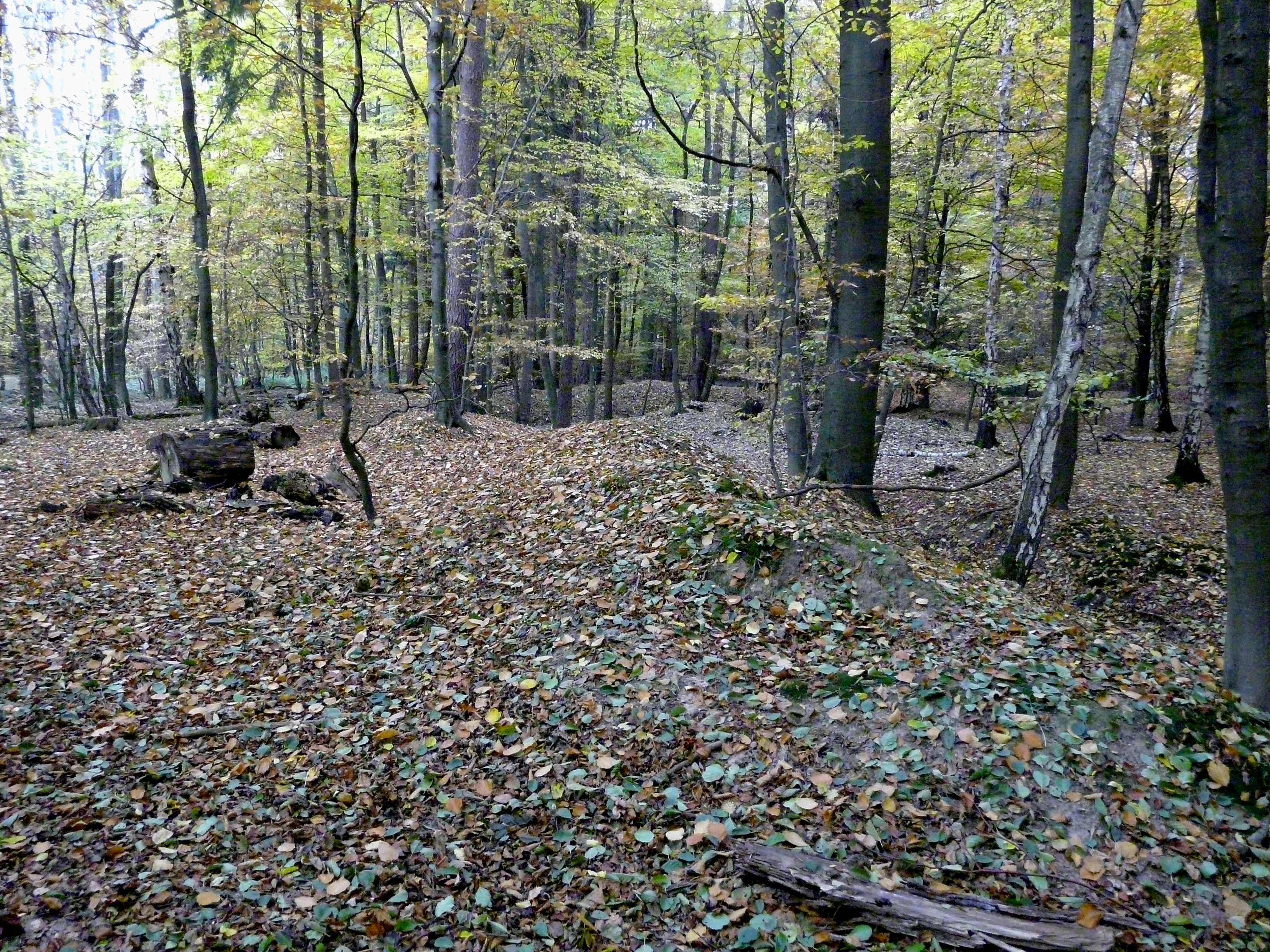 Kastell Saalburg, Westseite der stark überwachsenen Schanze A